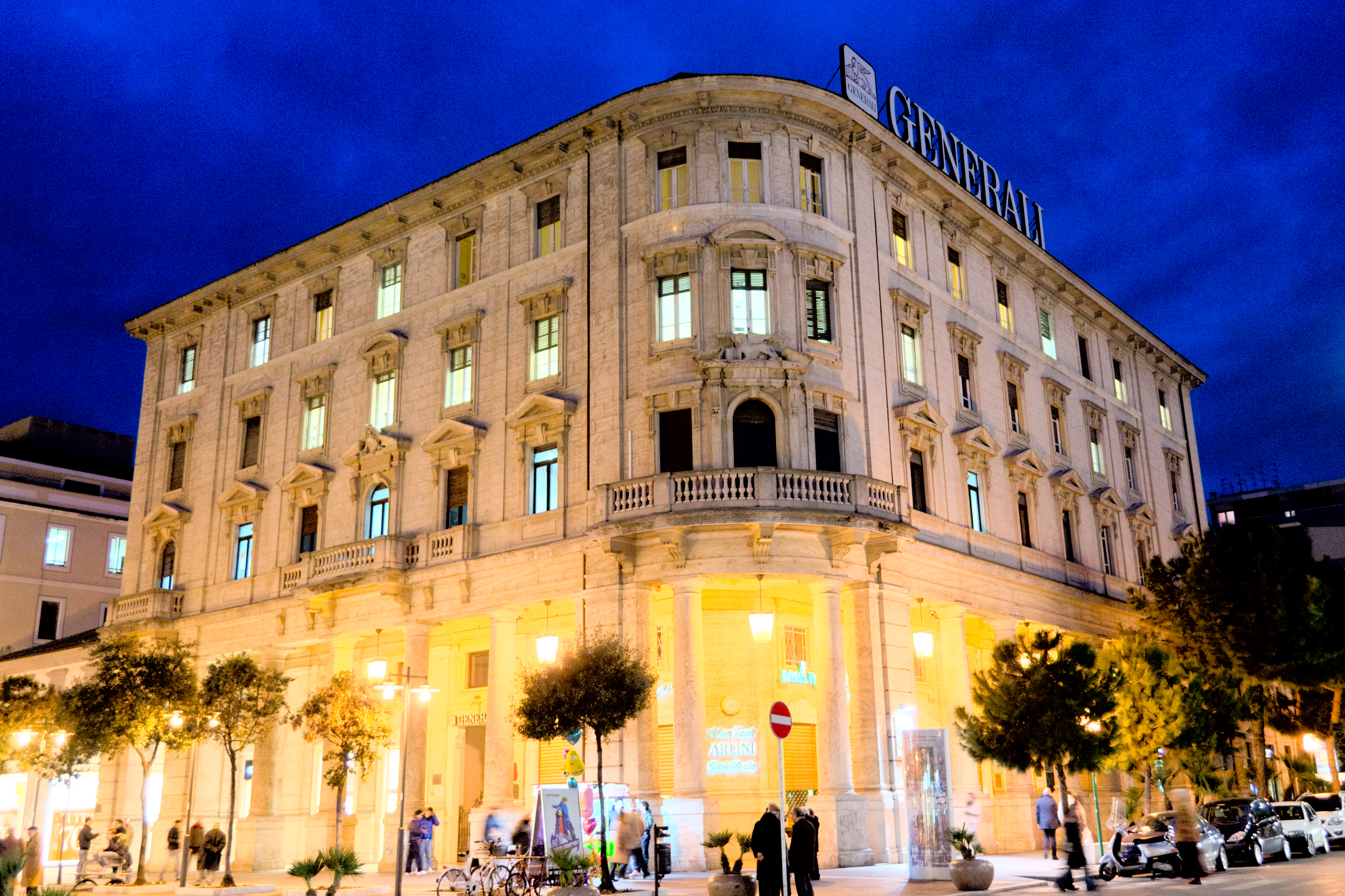 Palazzo Muzii, Pescara